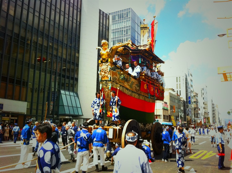 船鉾。2010年の祇園祭山鉾巡行にて。Unknown funehoko at gion matsuri